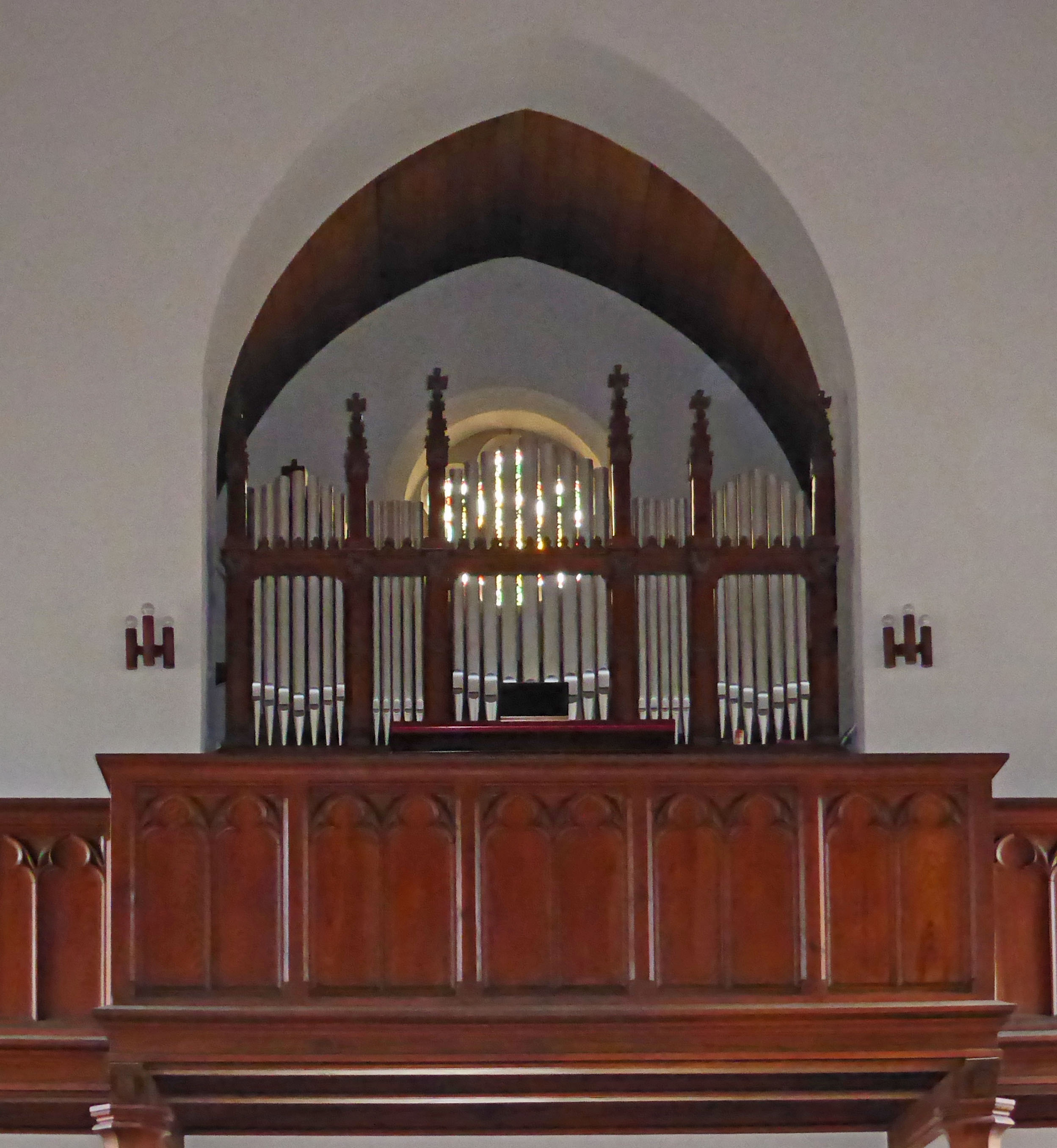 Orgel der Herz-Jesu-Kirche in Gommern